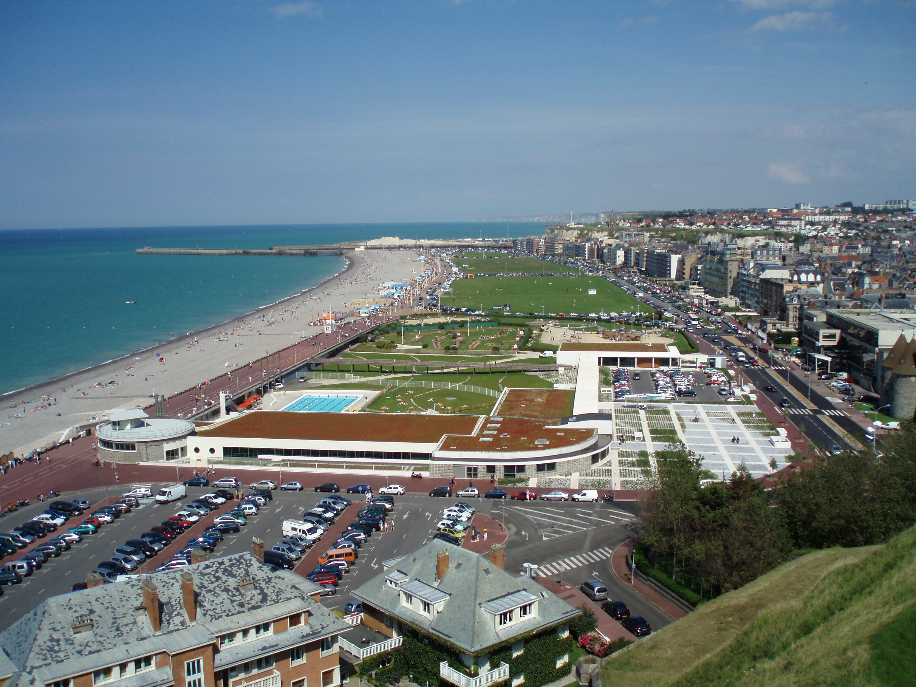 Panorama de la ville de Dieppe